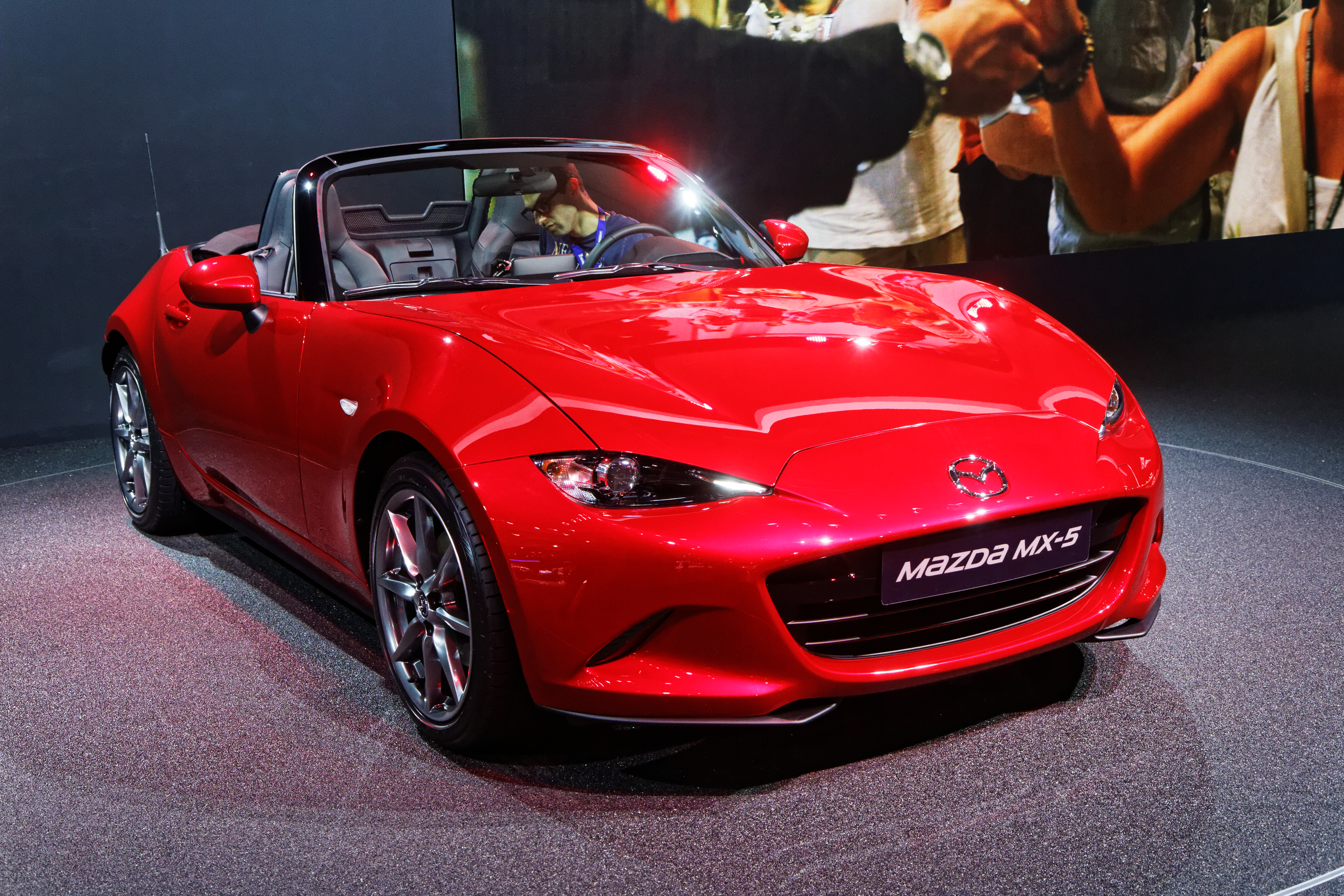 Une Mazda MX-5 présentée lors du mondial de l'automobile de Paris 2014.